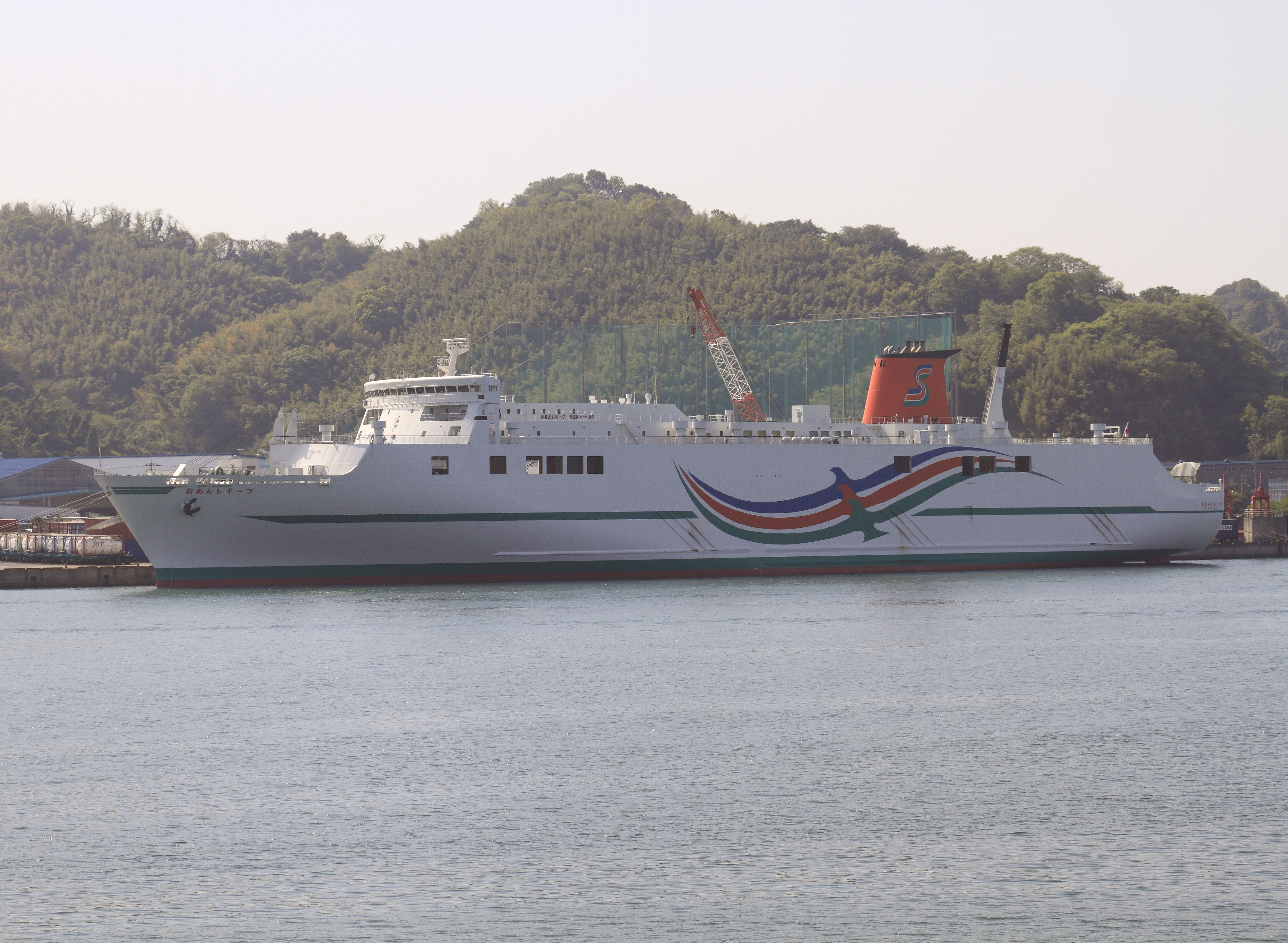 四国開発フェリー おれんじホープ（新居浜東港 羊蹄丸船上から撮影）